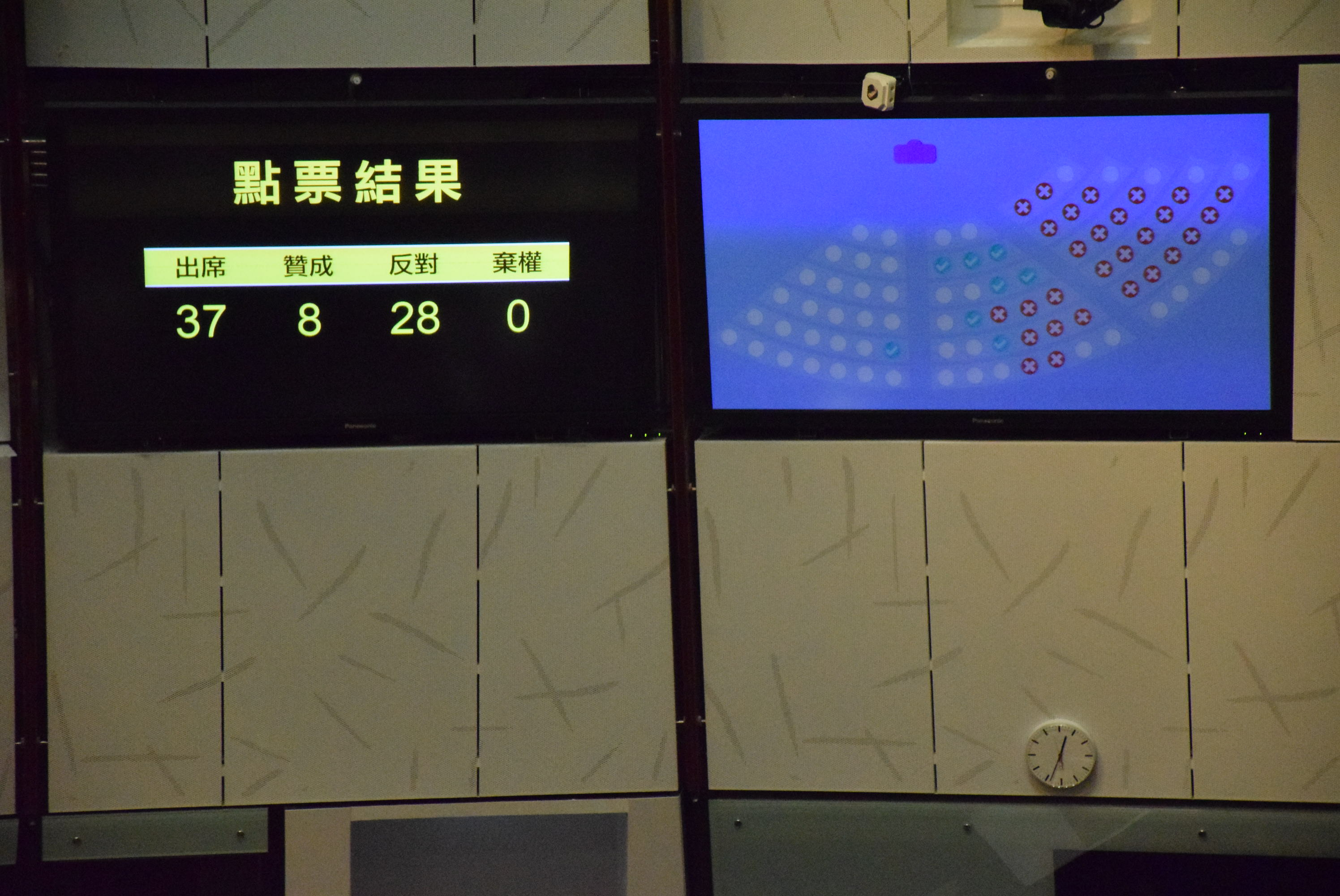 中文（香港）: 立法會會議廳的屏幕顯示港府特首普選決議案的表決結果，被大比數否決。（美國之音 湯惠芸攝)